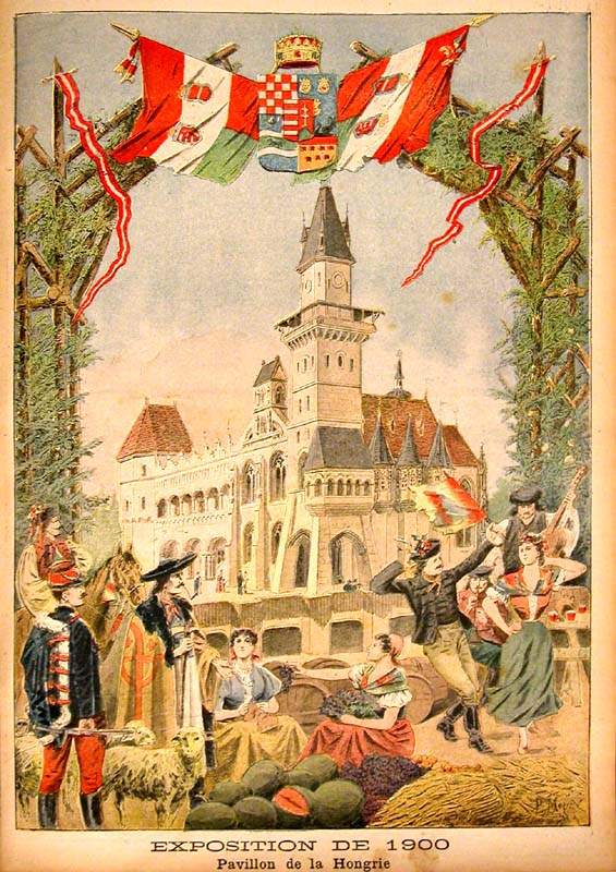 Exposition Universelle 1900 Paris - Pavillon de la Hongrie, avec à gauche reproduction de la façade du Palais Rákóczi. Illustration „Le Petit Journal. Supplément illustré.” (Paris, mars 1900)